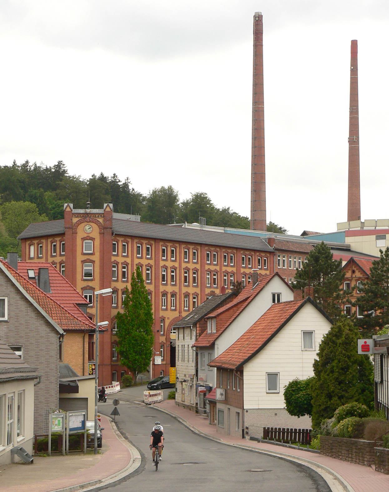 Hafenhaus von 1908 der Glashütte Grünental